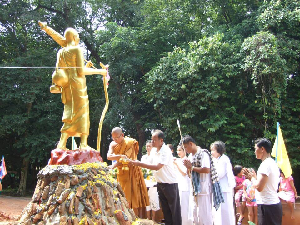 พระพุทธรูปด้านหน้าวัด ปาง เดินธุดงค์ ด้านหน้าวัด.